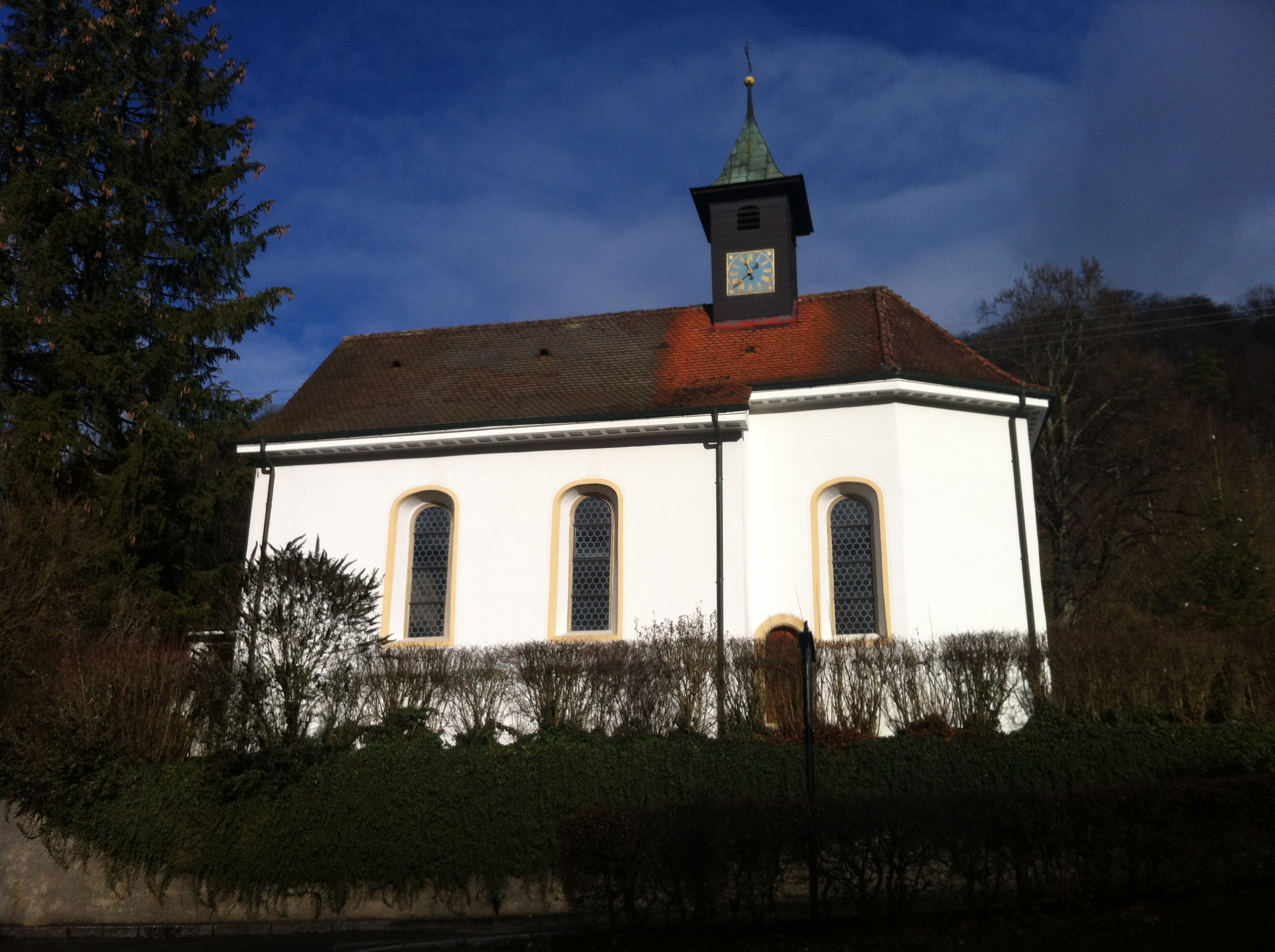 Küssnach, Ortsteil der Gemeinde Küssaberg im Landkreis Waldshut in Baden-Württemberg. Antonius-Kapelle.